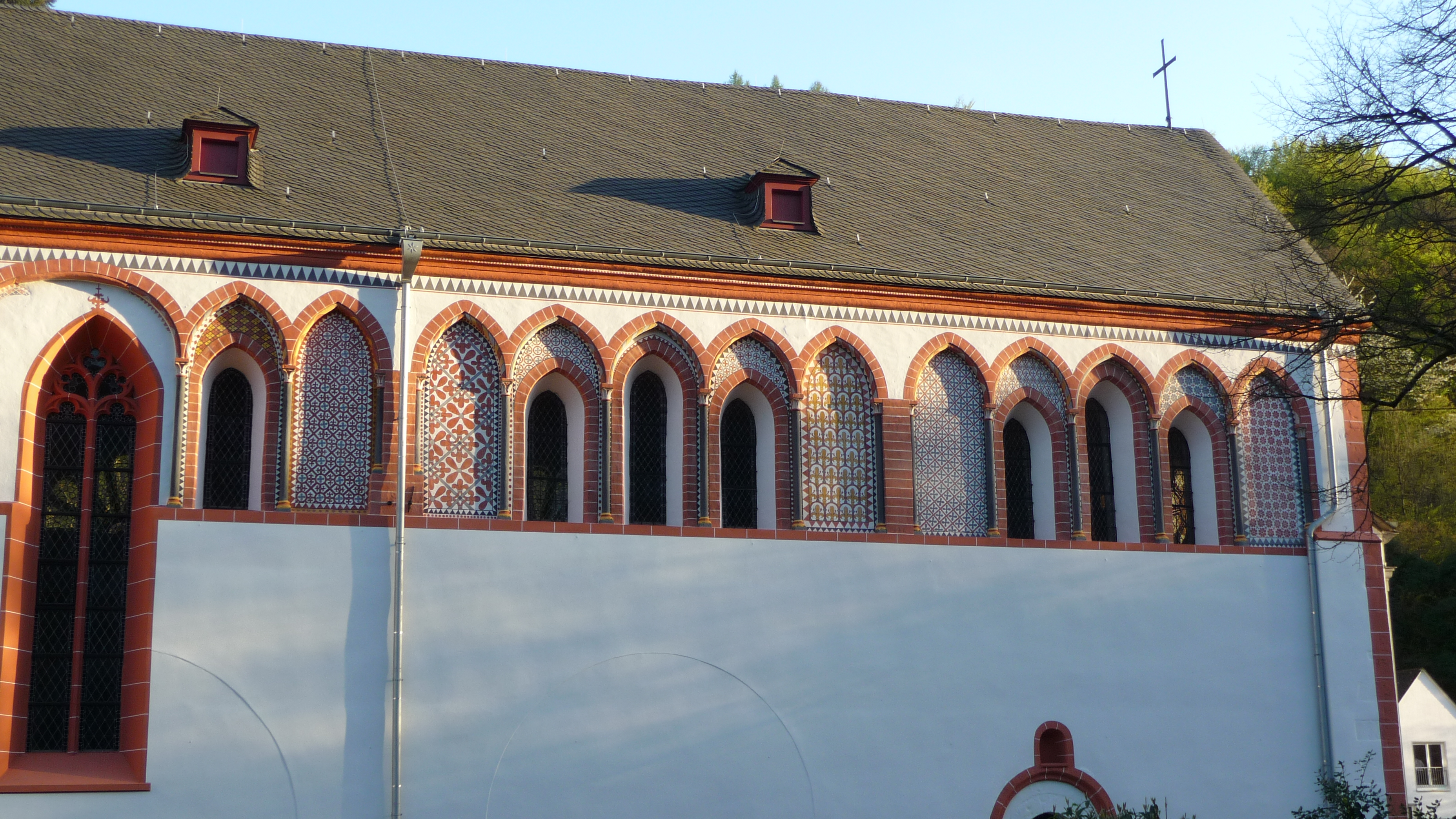 Abtei Sayn, Romanische Außenmalerei an der Nordwand der Kirche